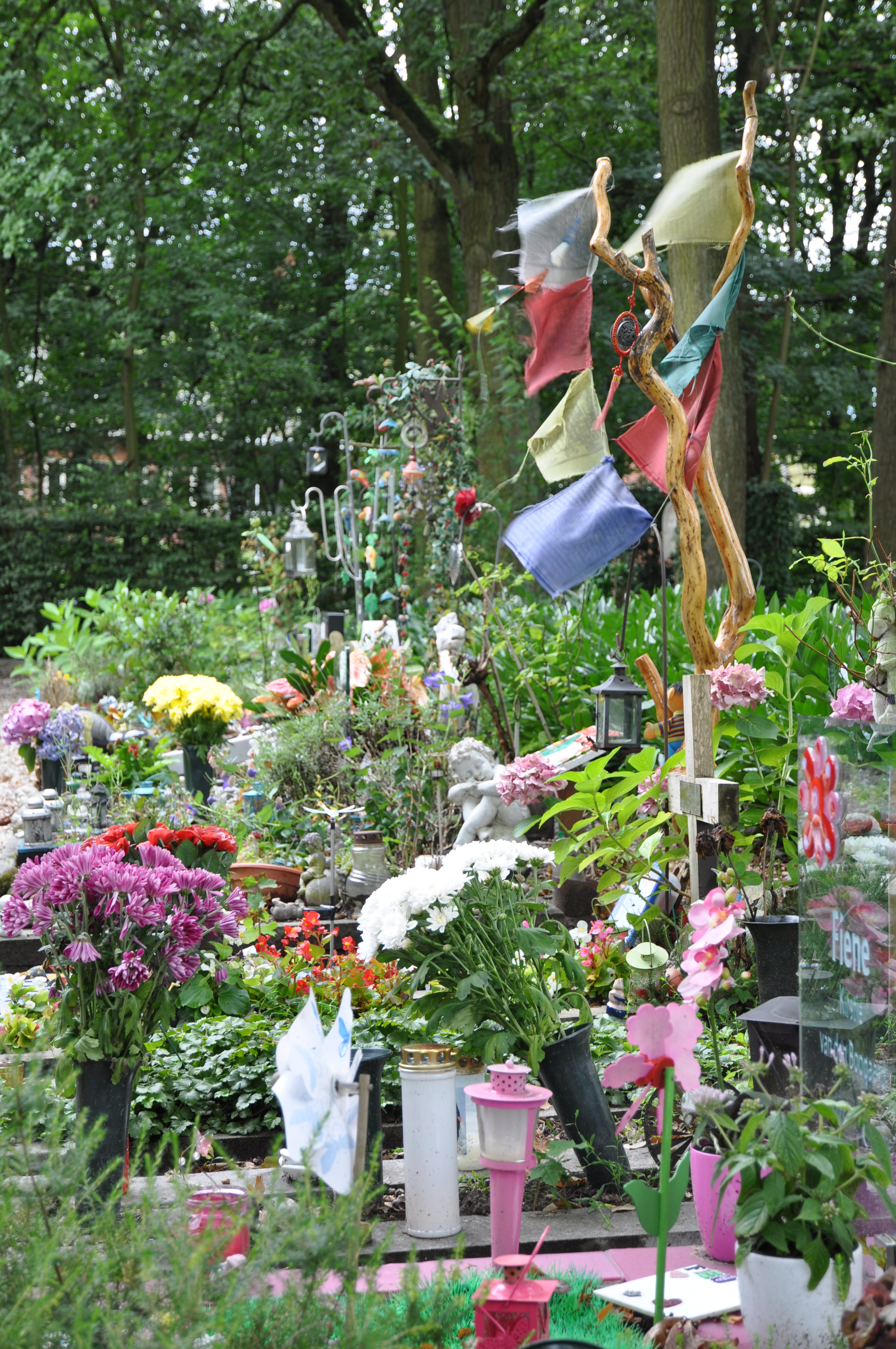 Begraafplaats Sint Barbara in Utrecht.